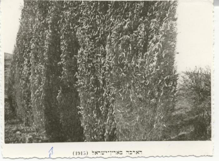 נחילי ארבה בכמויות עצומות